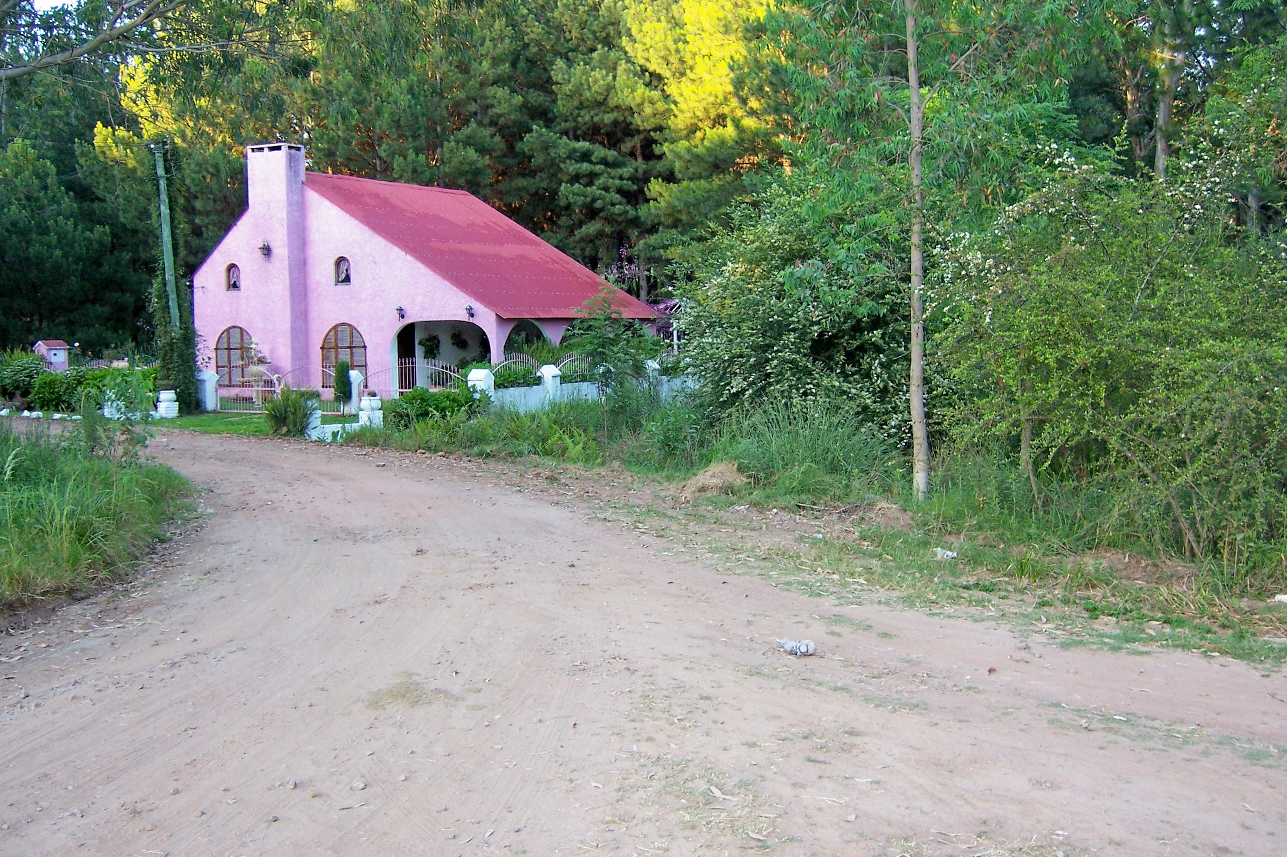 Vista de una casa en el Balneario Iporá, Tacuarembó, Uruguay.